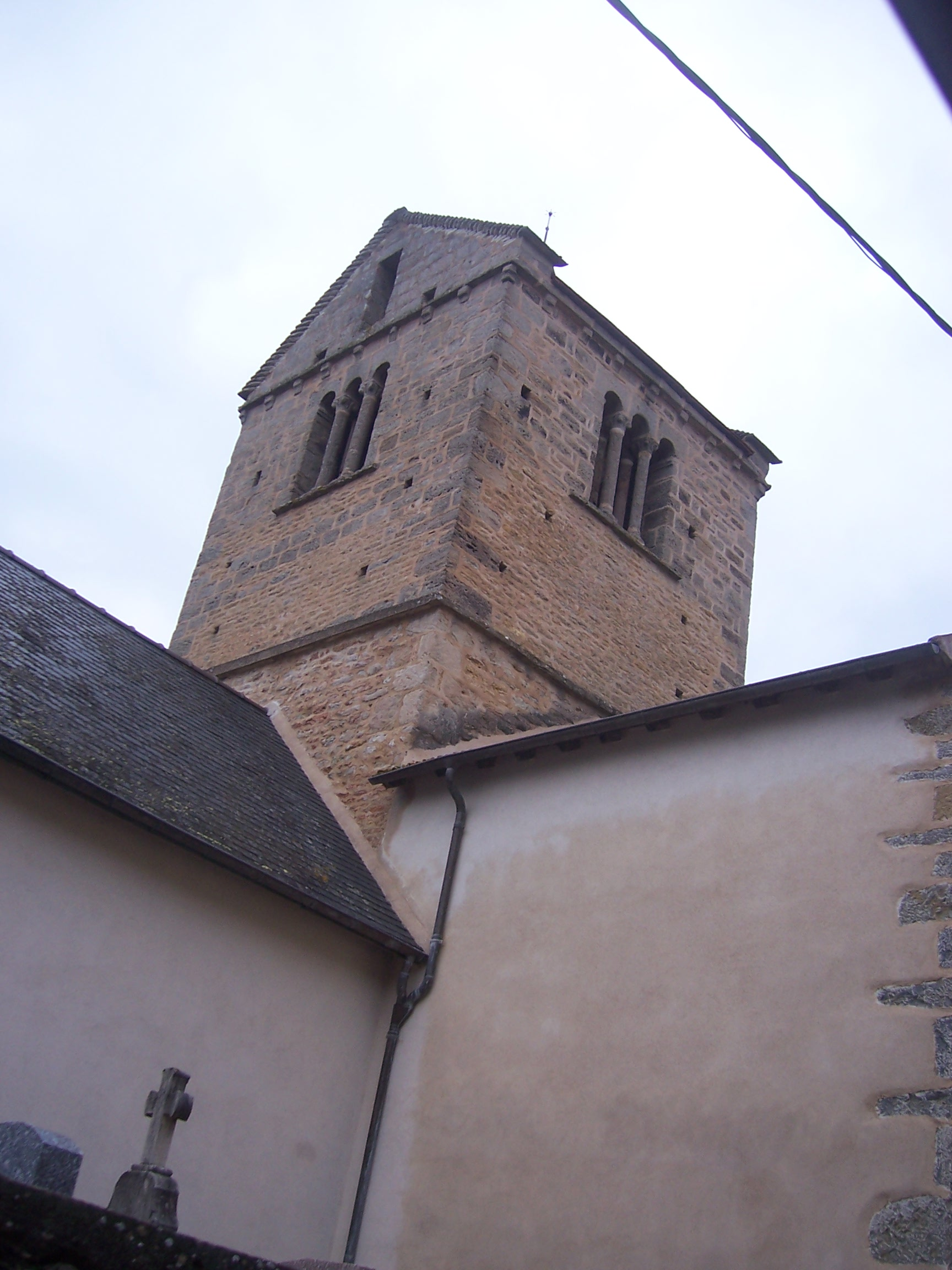 Eglise de Passy